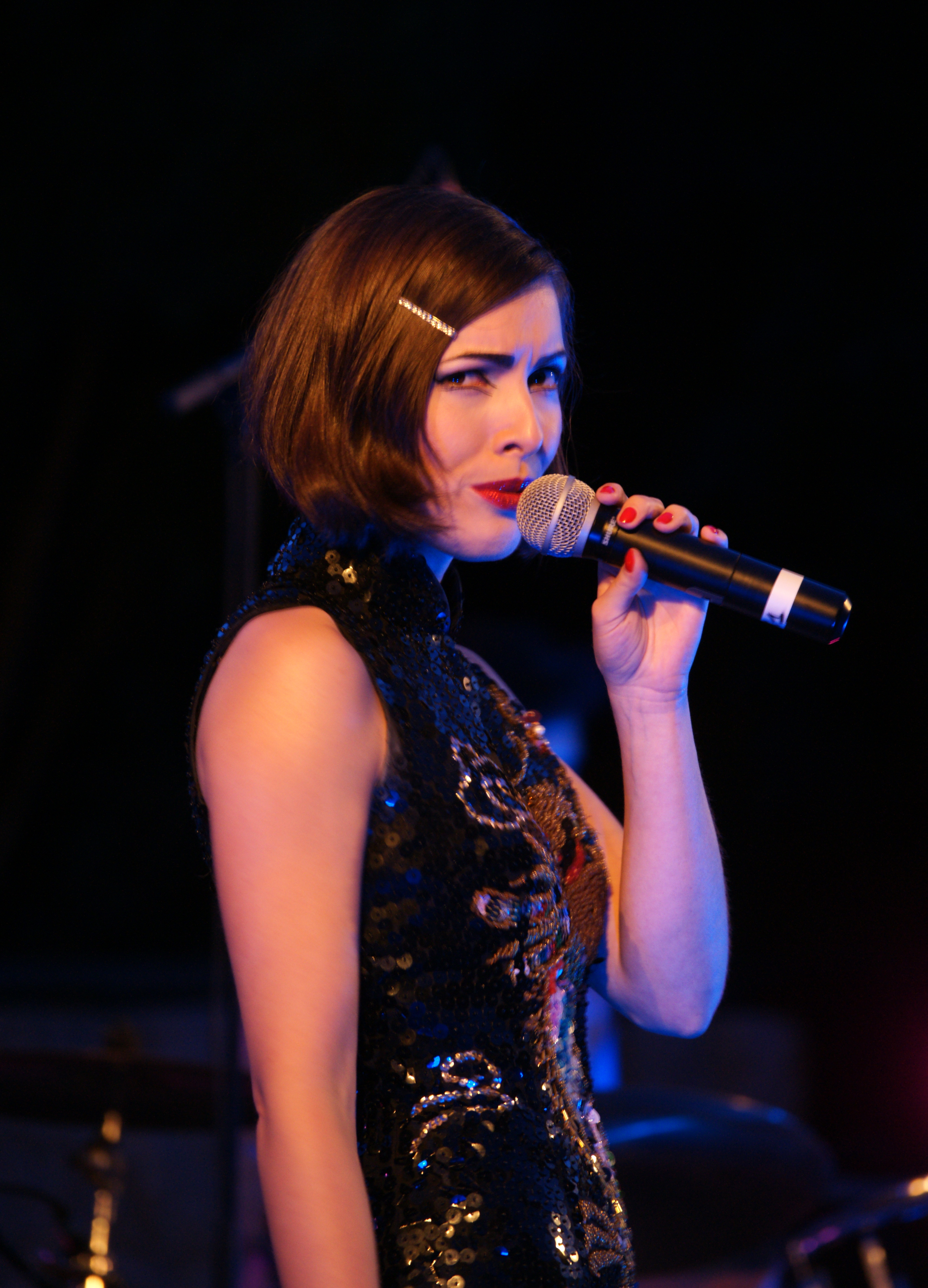 Dimie Cat, Carros 2014